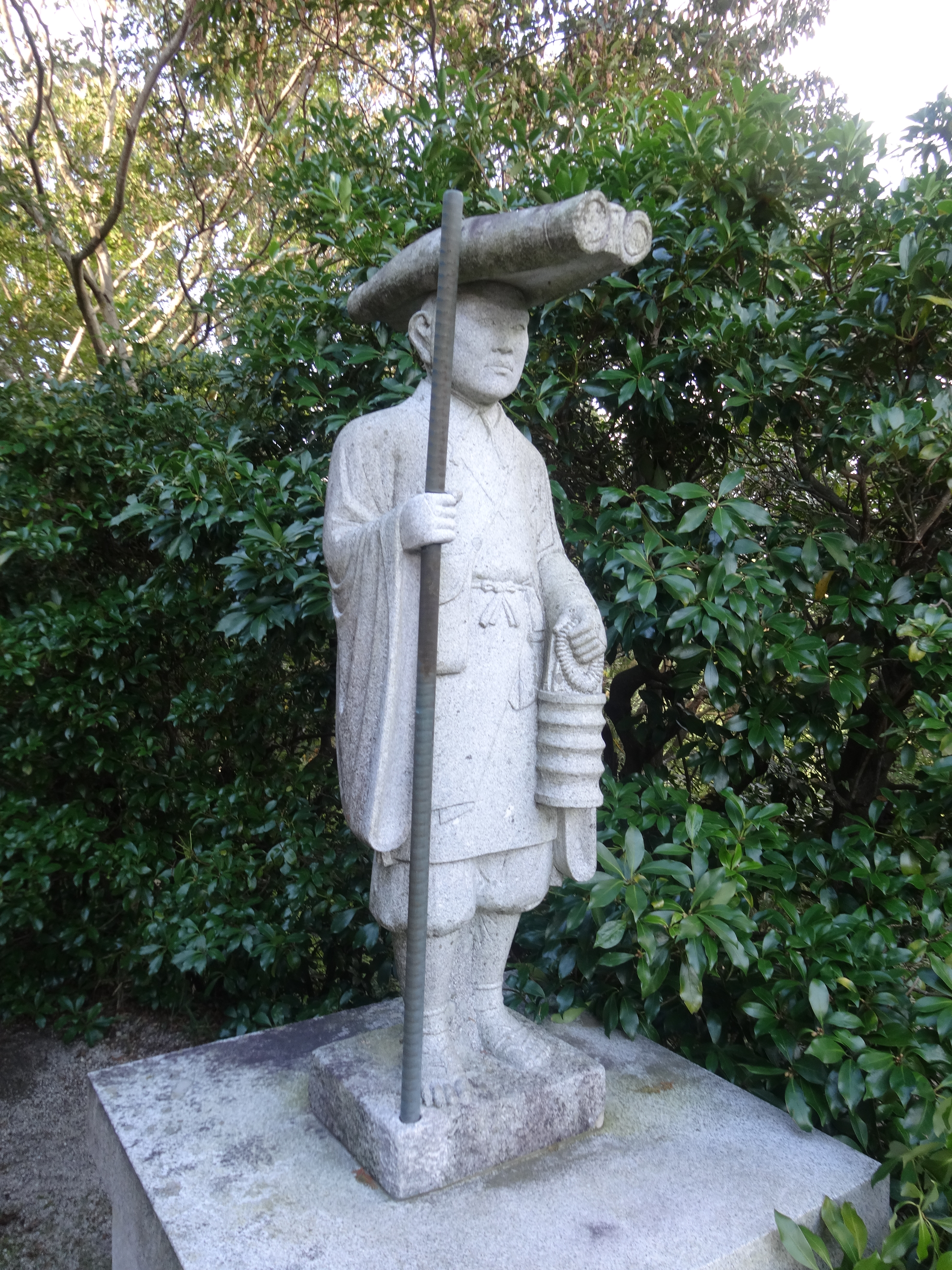 相応和尚（建立大師）石像比叡山無動寺明王堂